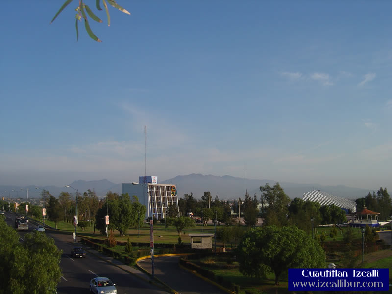 Imagen del Municipio Cuautitlán Izcalli, Estado de México, México, perteneciente a la Zona Metropolitana de la Ciudad de México, en donde se puede apreciar el Palacio Municipal.